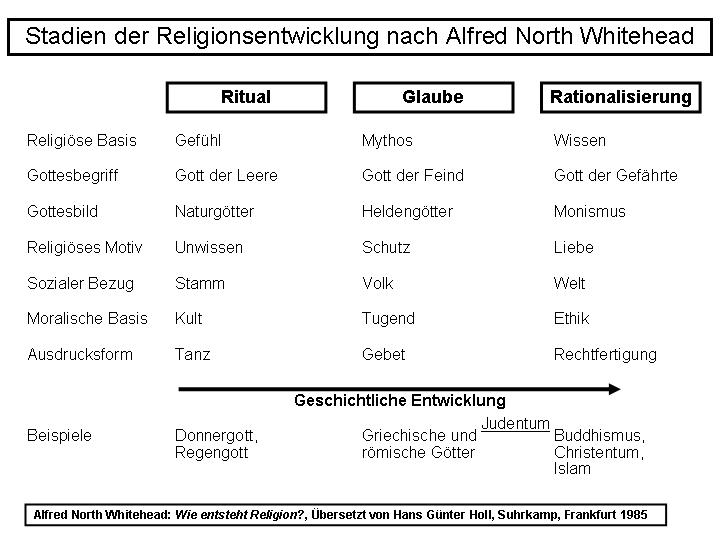 Tabellarische Übersicht zu Alfred North Whitehead Wie entsteht Religion?